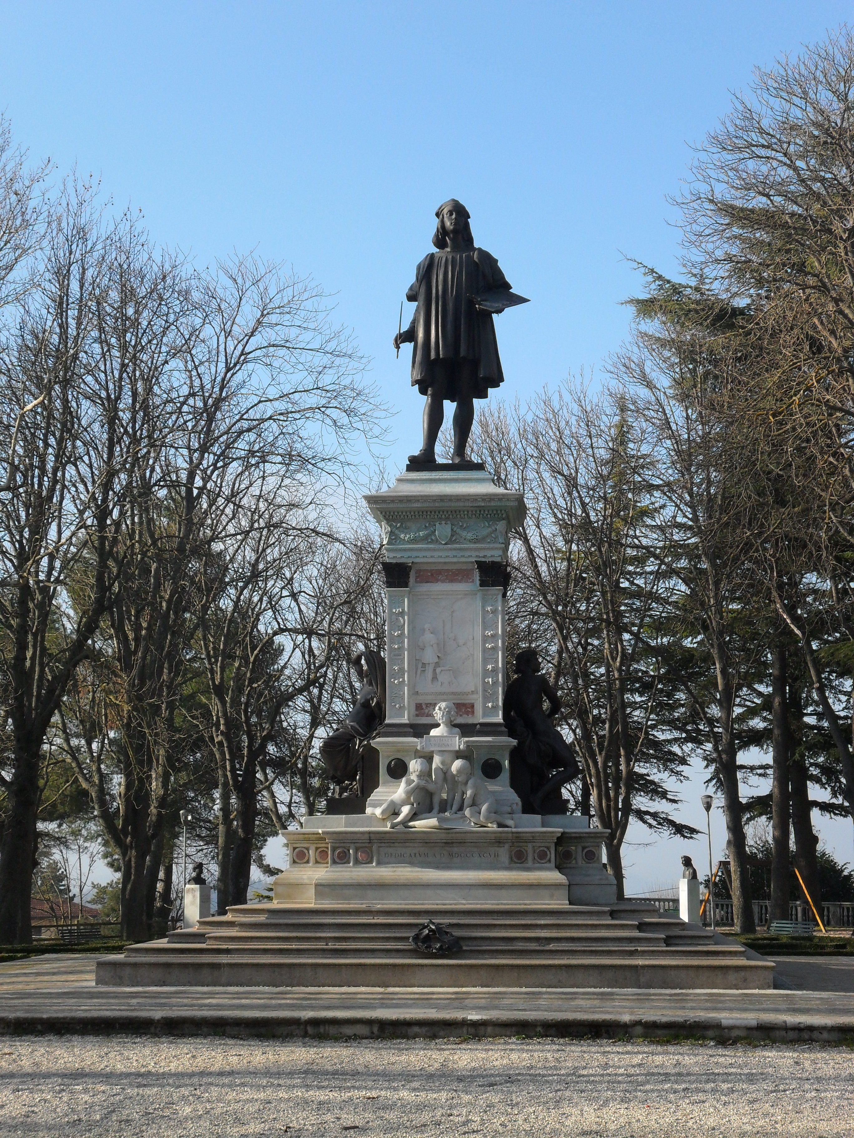 Urbino 01 040